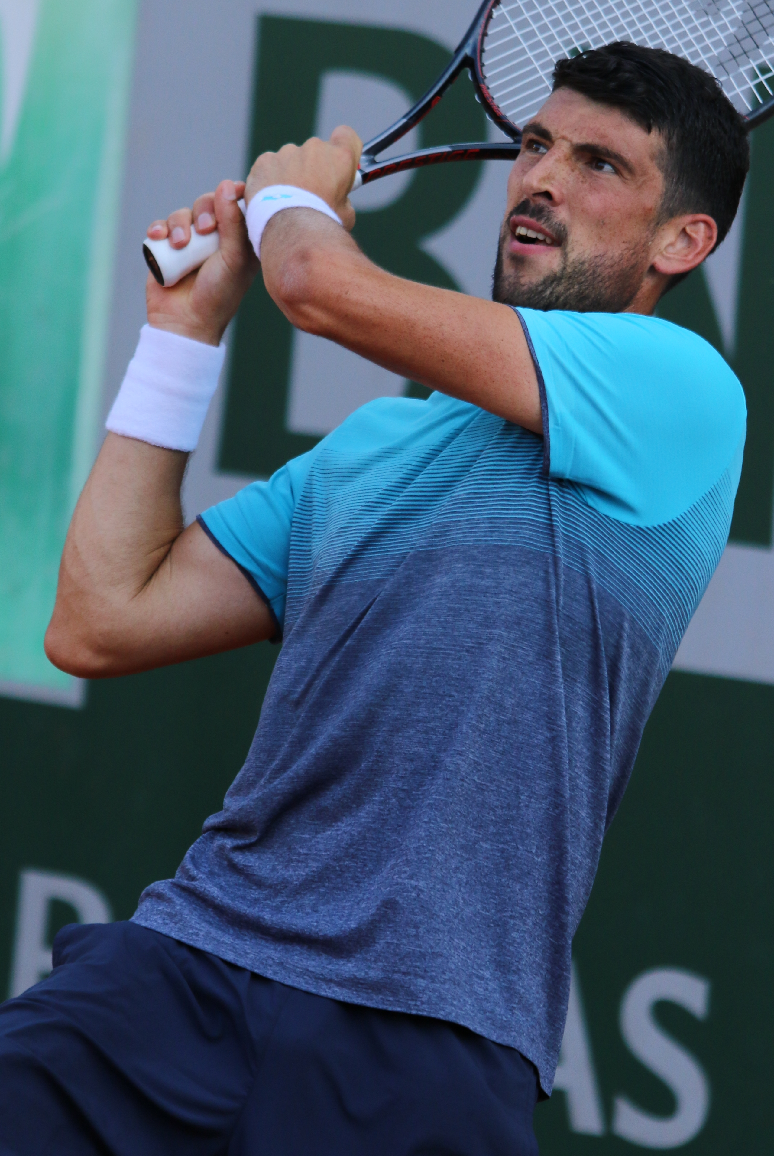 Skugor RG18 (11)